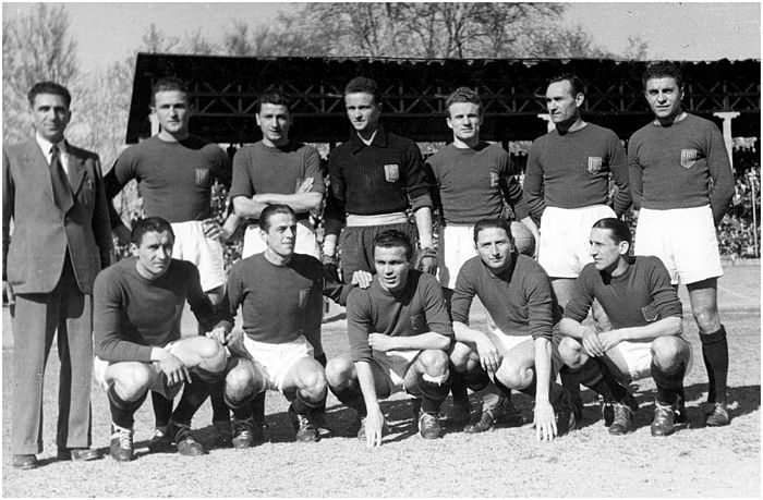 Formazione del Torino FIAT nel campionato di guerra 1943-44.